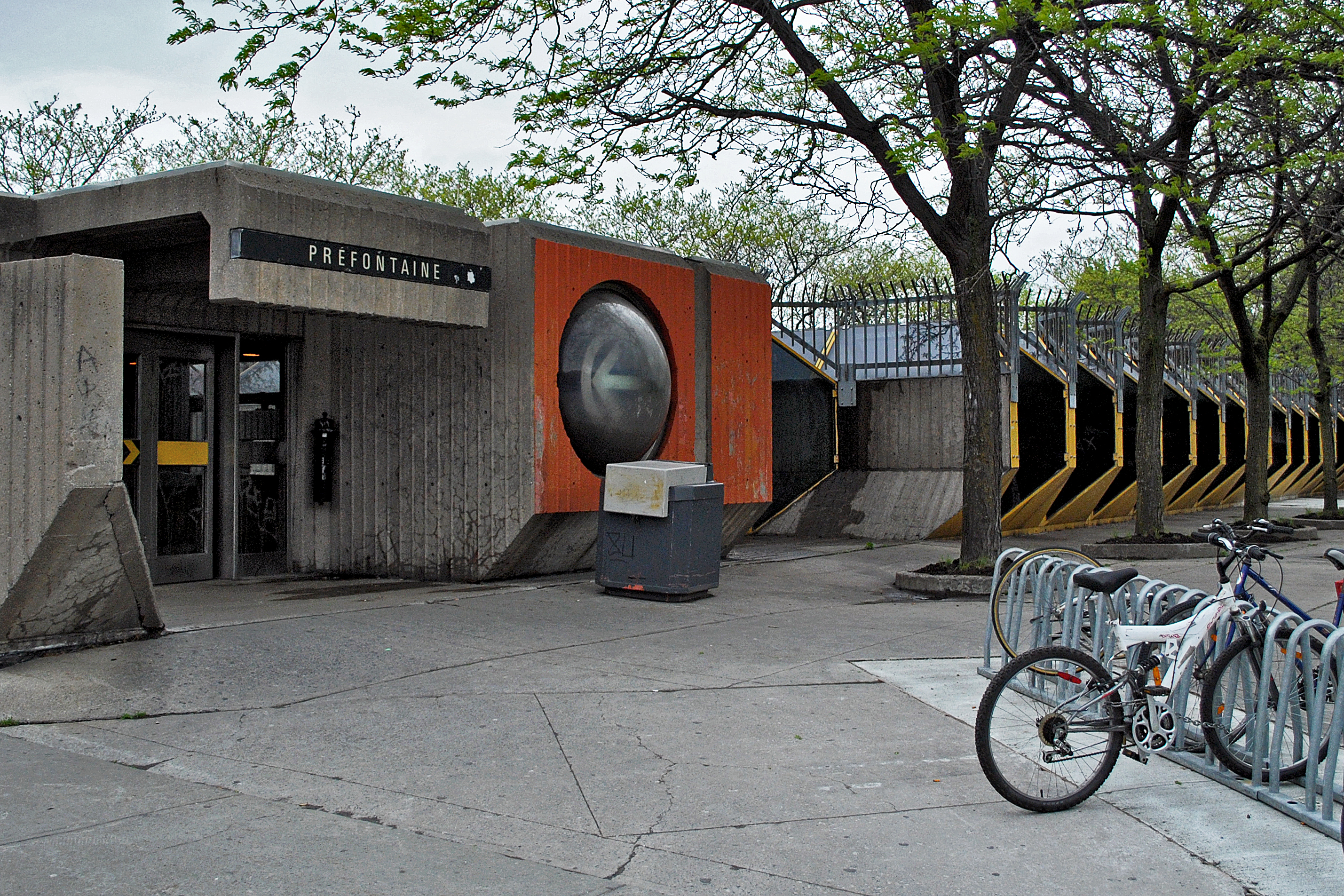 Édicule de la station Préfontaine du Métro de Montréal